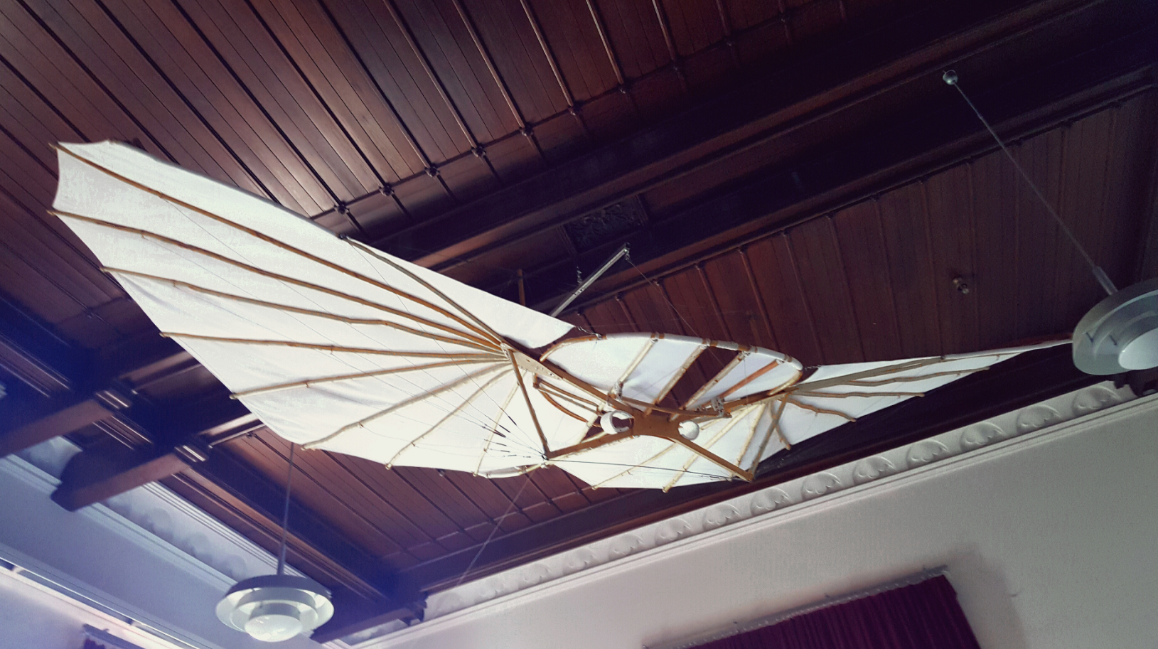 Nachbau des Lilienthal-Gleiters in der Aula des Lilienthal-Gymnasiums